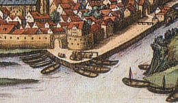 Hann. Münden 1584 Kupferstich von Frans Hogenberg